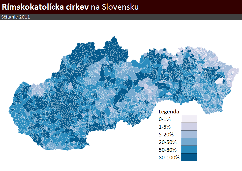 Rímskokatolícka cirkev na Slovensku.